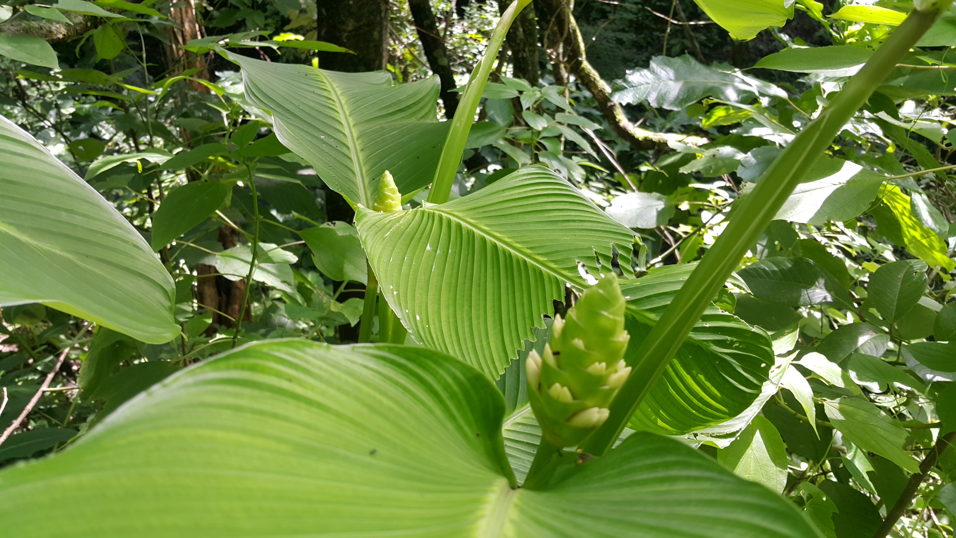 Matita Calathea macrosepala K. Schum